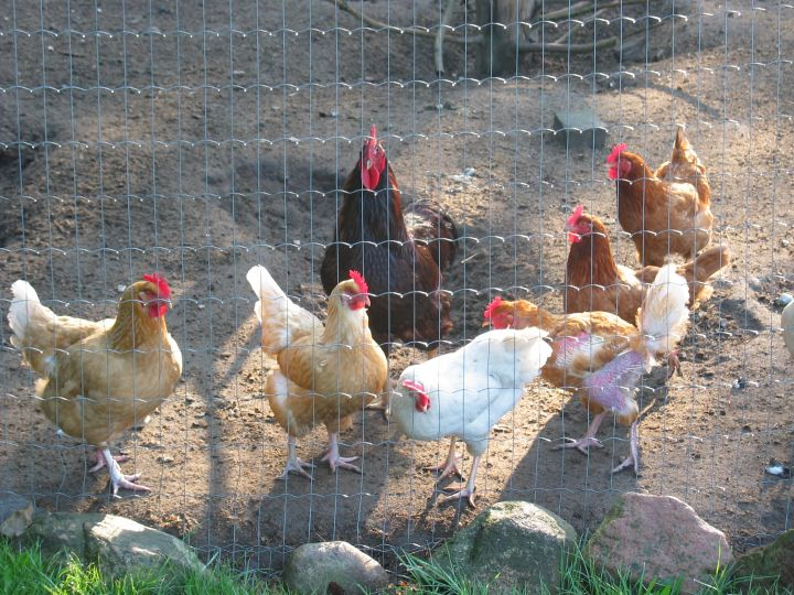 Høns i hønsegård